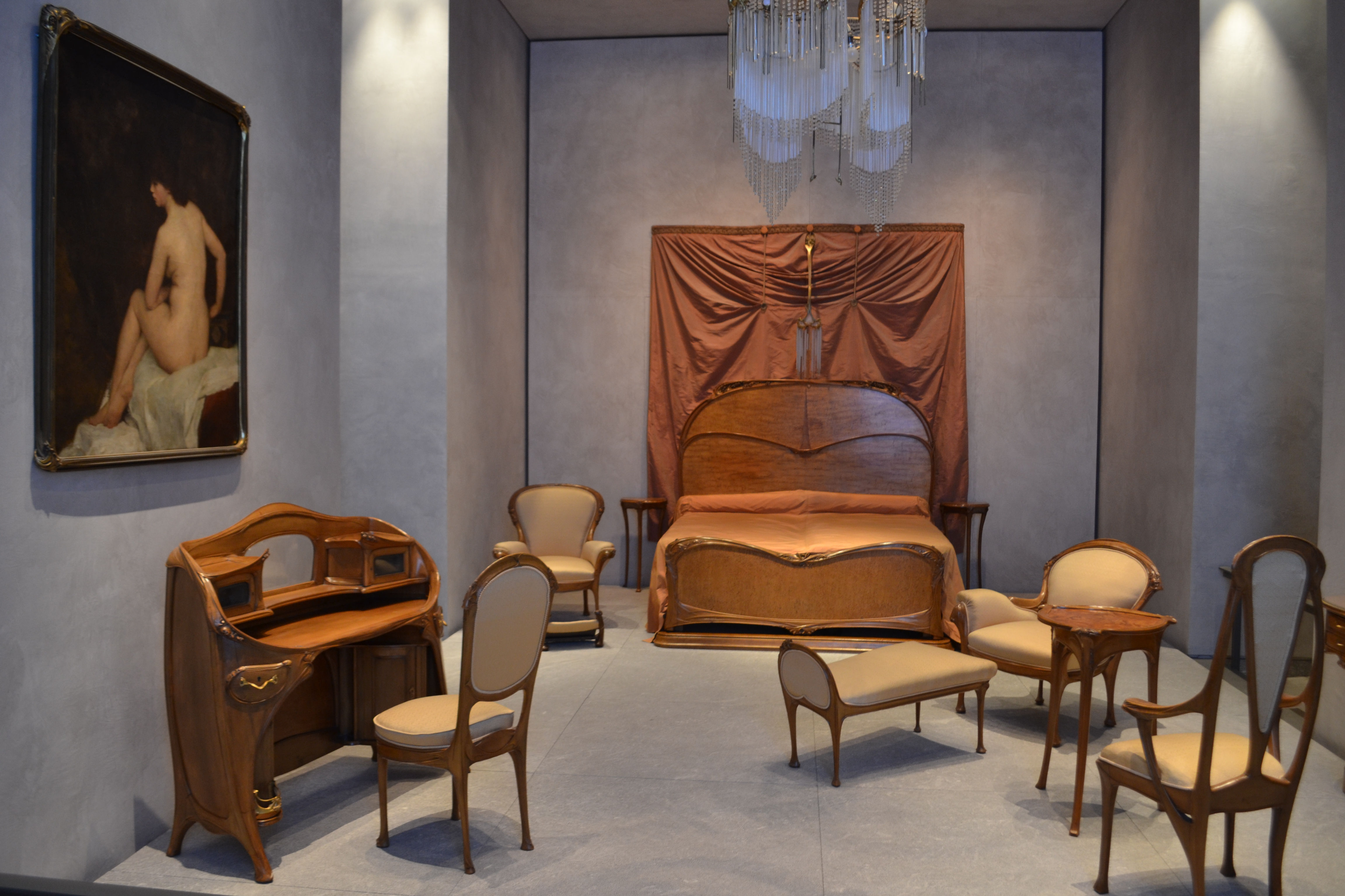 Mobilier de la chambre d'Adeline Oppenheim, épouse d'Hector Guimard, 122 avenue Mozart, Paris (musée des Beaux-Arts, Lyon).